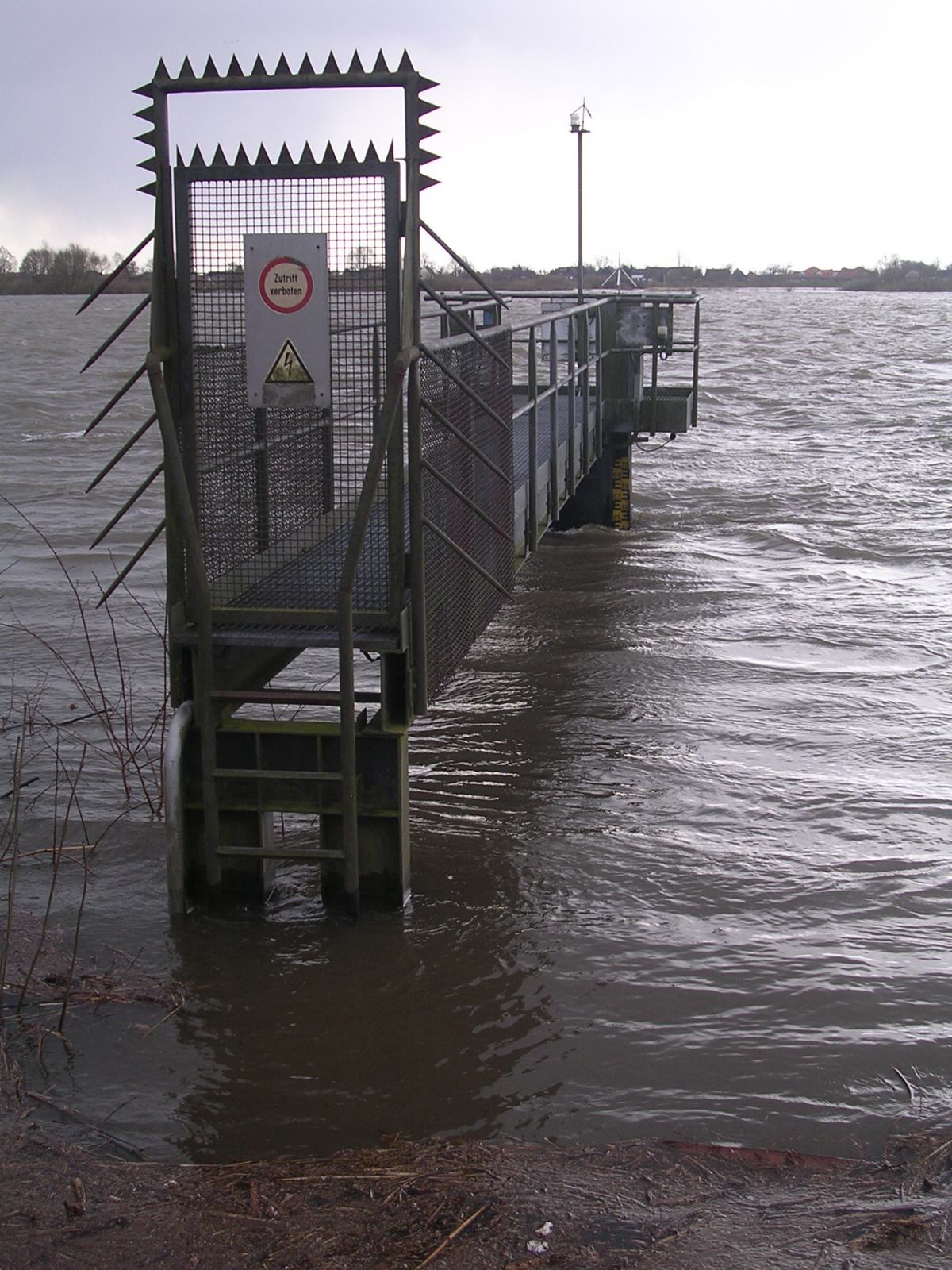 Elbpegel in Geesthacht am 09.04.2006 16:00, einen Tag vor dem Wasserscheitel der Frühjahrsflut. Höhe: 6,50 m.